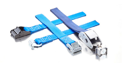 Produktgruppe "Gurte und Netze"